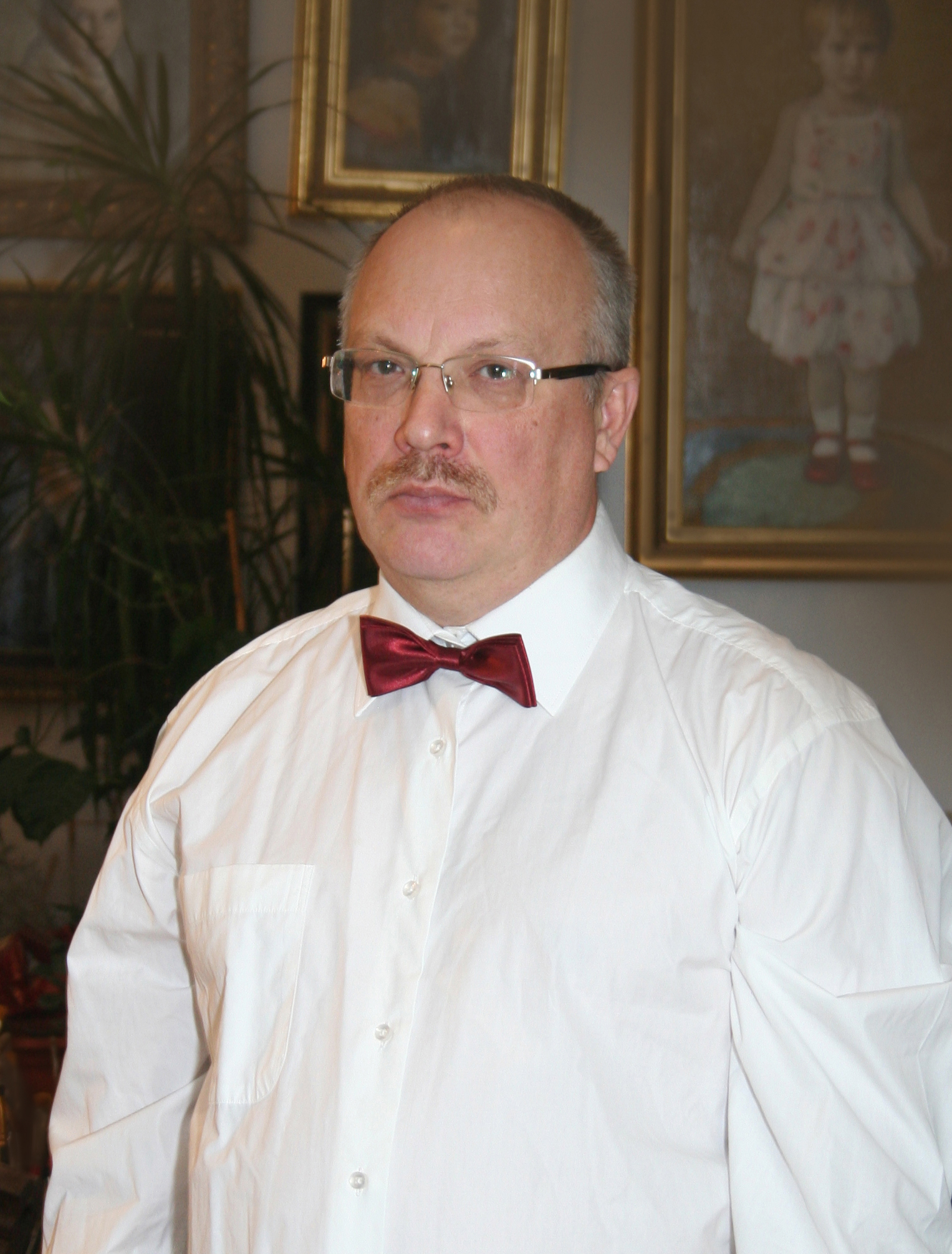 портрет Александра Кравчука